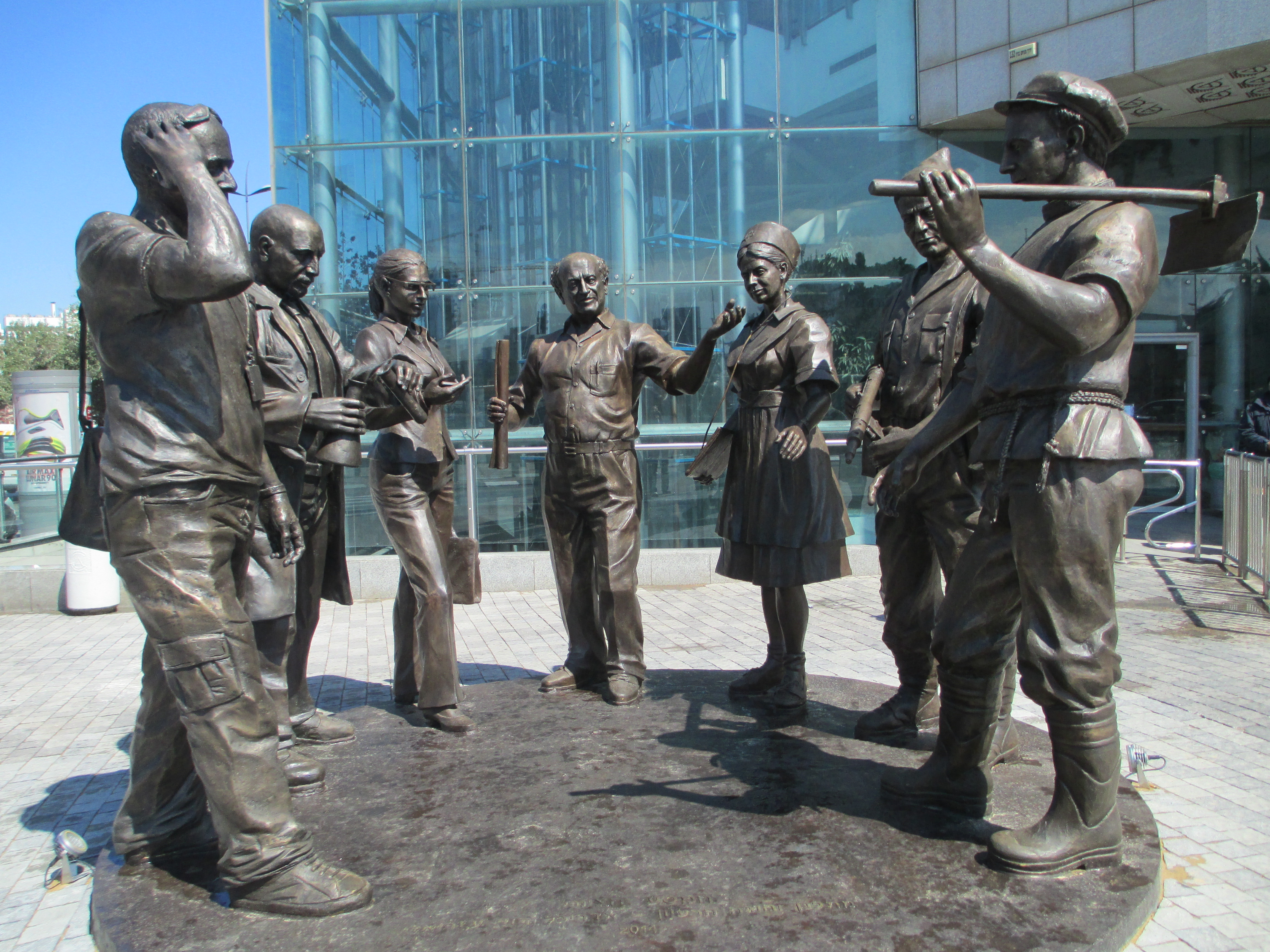 הפסל המסע הציוני של דוד עזריאלי - 2014. רח' גבעת התחמושת פינת דרך מנחם בגין, ליד הכניסה לקניון עזריאלי